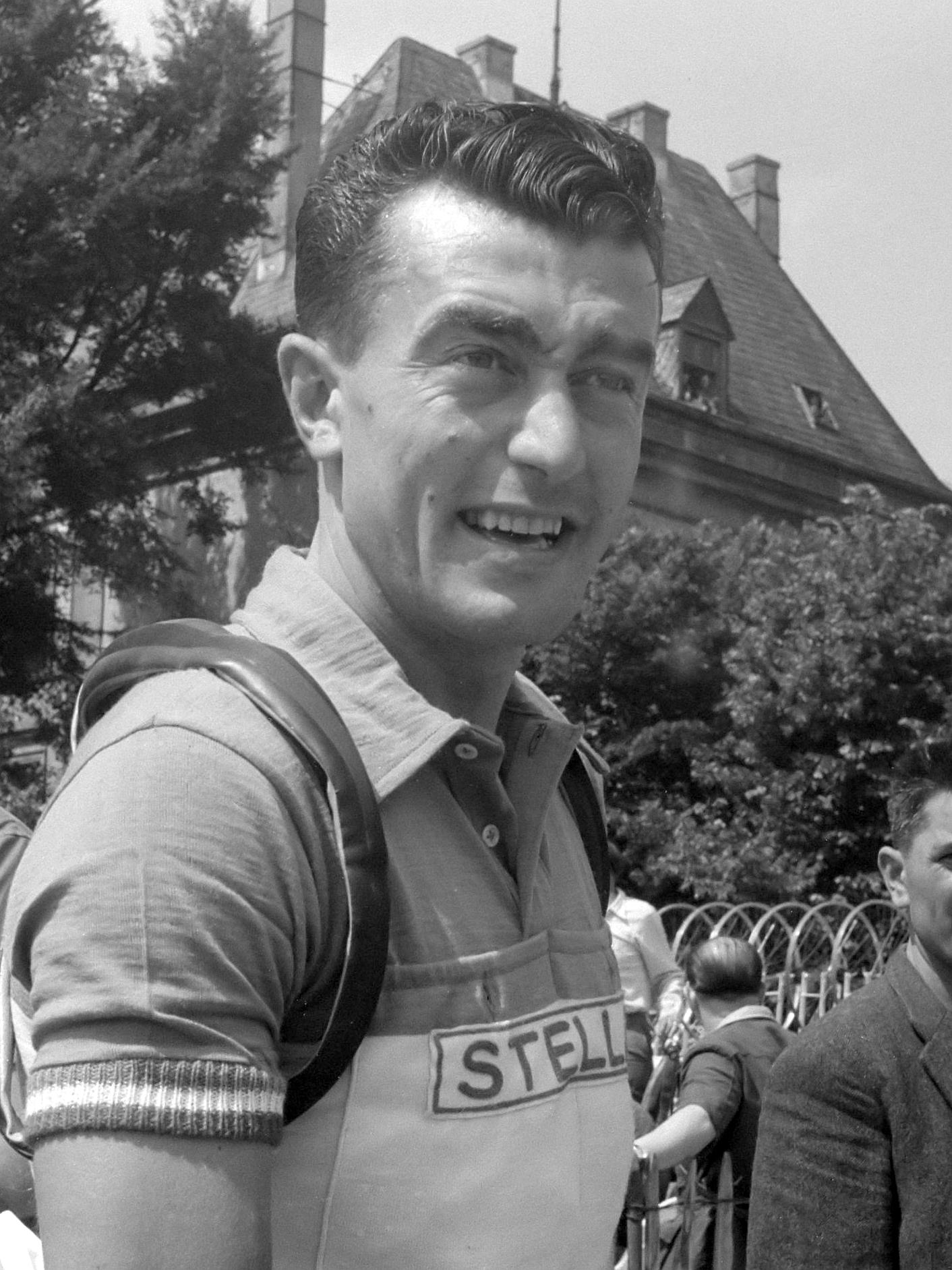 Tour de France. Louison Bobet (Frankrijk) 4 juli 1951